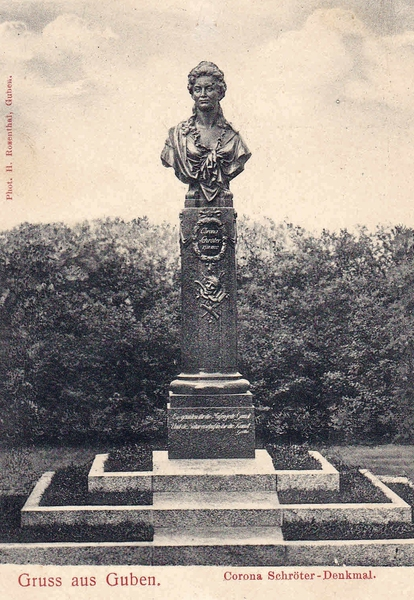 Das 1905 in Guben feierlich der Öffentlichkeit übergebene Corona Schröter-Denkmal, hier als älteste bekannte Aufnahme und als Ansichtskarte vervielfältigt durch den Gubener Fotografen Herbert Rosenthal ...